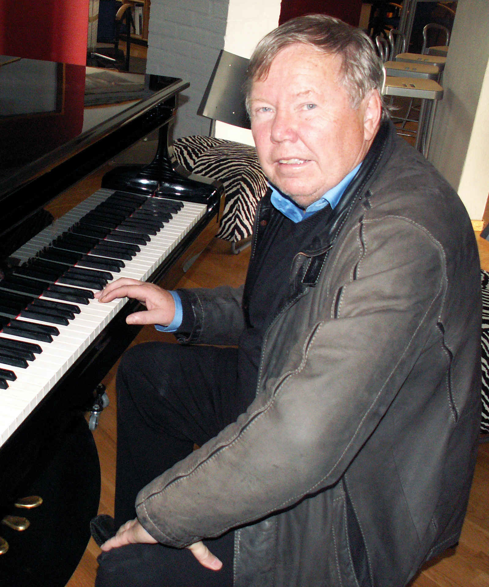 Bert Karlsson vid sin Steinway flygel.